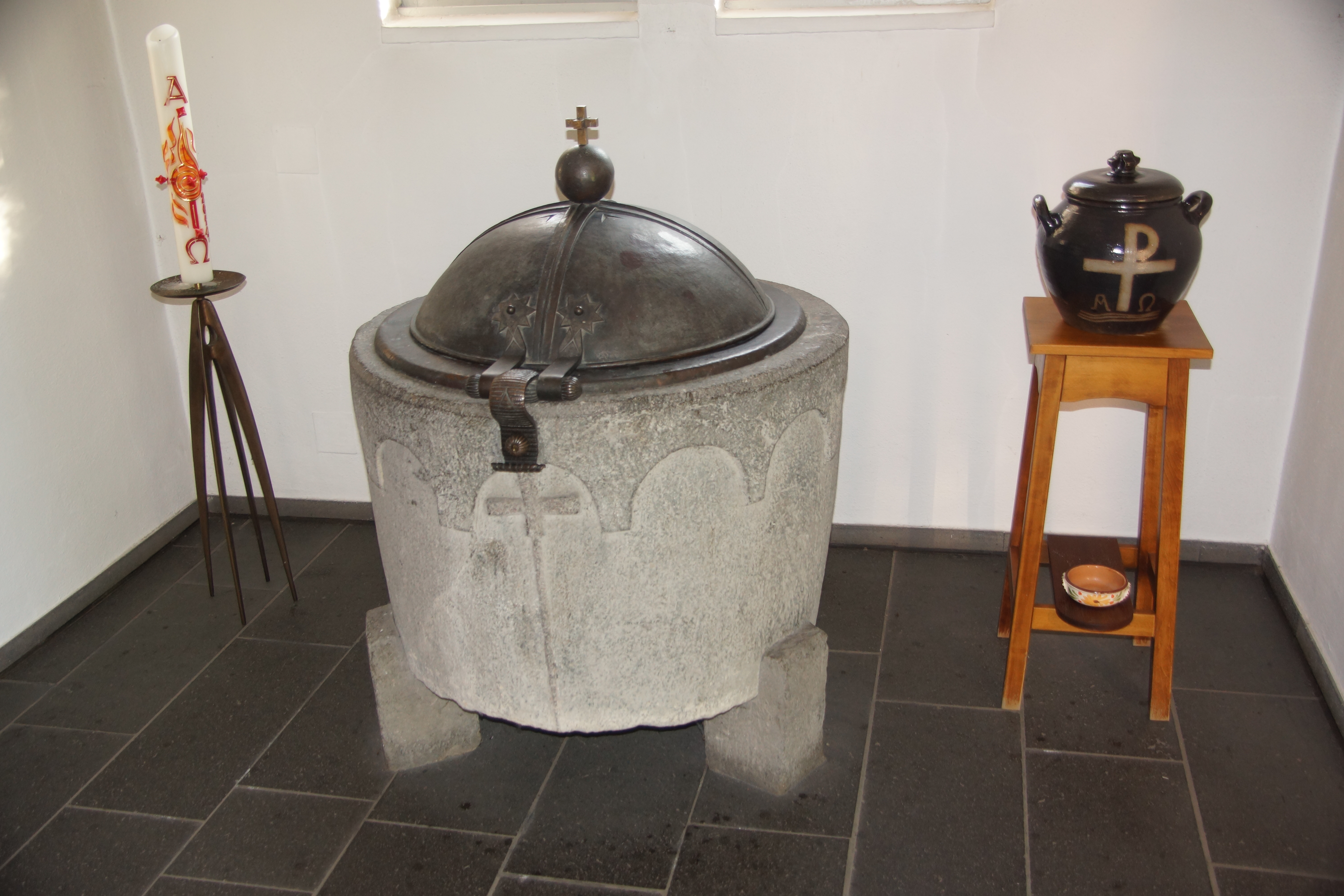 Taufbecken Sankt Mauritius Frechen-Bachem